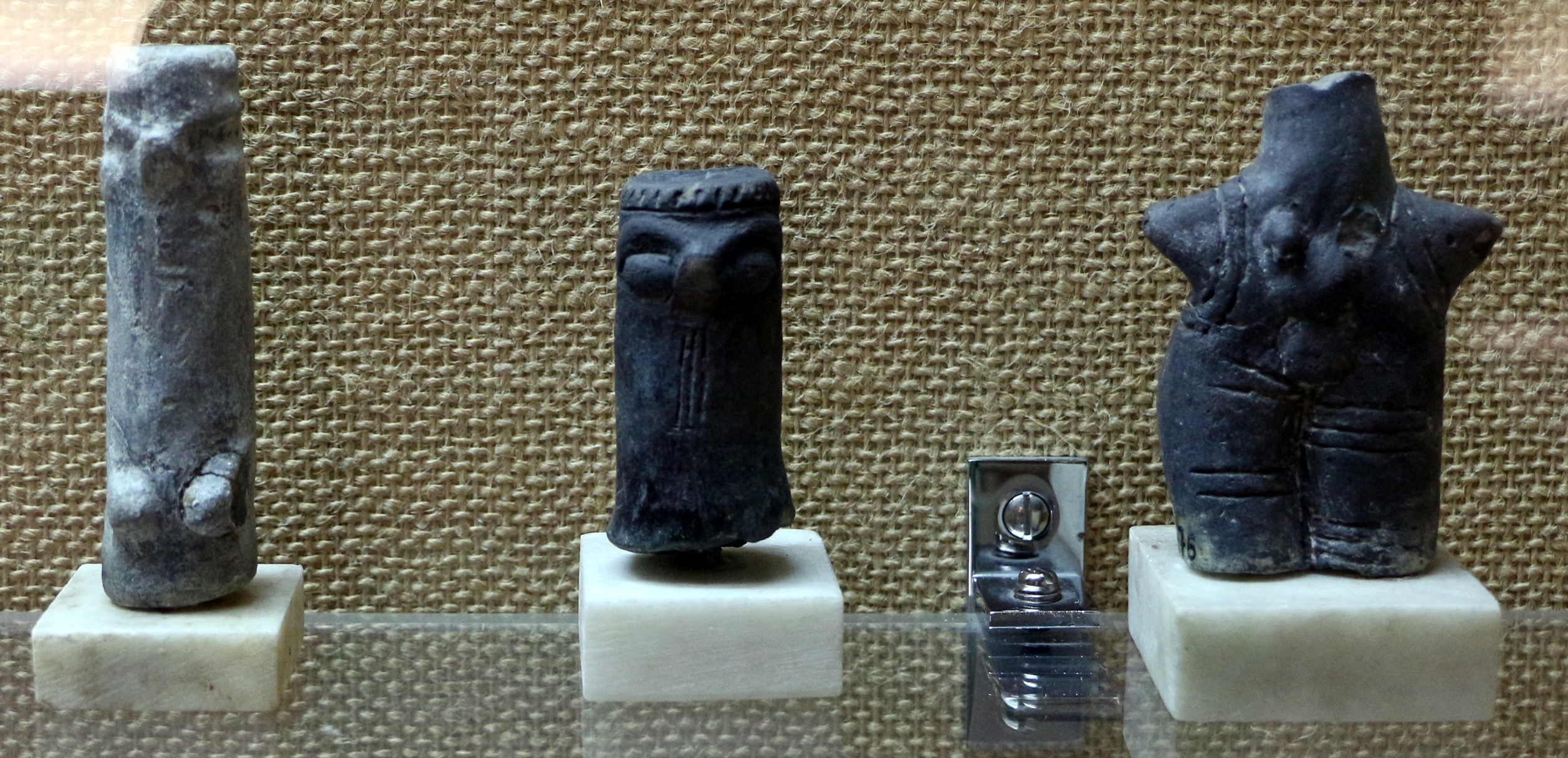 Muzeu Historik Kombëtar